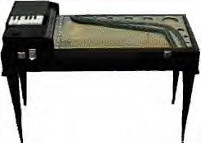 Gusli Tischversion